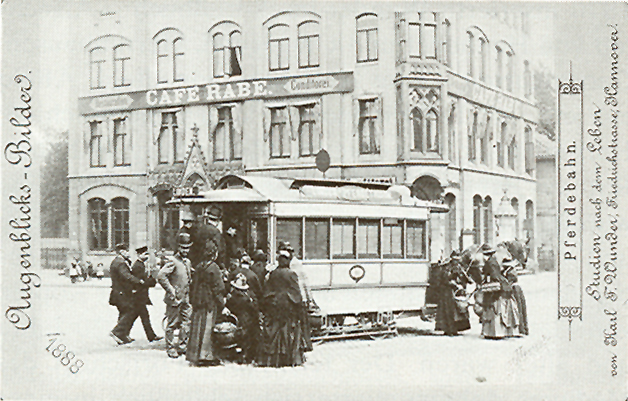 Eines der Augenblicks-Bilder, hier mit dem Seiten-Titel Pferdebahn und in den Ecken angebrachten Blindstempeln 1888 (links unten) und Moment-Aufnahme. Wunder ließ diesen Karton-Träger für seine Augenblicks-Bilder vordrucken mit dem Text "Studien nach dem Leben / von Karl F. Wunder, Friedrichstrasse, Hannover Zu sehen sind 19 Menschen der Zeit, alle mit Kopfbedeckung. Die Frauen, die hier vor dem Einzelwagen der Linie Linden Pferdethurm stehen, scheinen sämtlich mit Körben bepackt und einer vergleichsweisen Unmenge an Körperstoffen. Eine der Damen trägt unterwärts offensichtlich noch eine Zweite Tournüre (was sich auf diesem Scan aus dem Buch leider nur mäßig erkennen läßt). Im Hintergrund, auf dem Bürgersteig vor der Restauration. Conditorei. Café Rabe., beobachtet eine Gruppe Kinder das Geschehen.